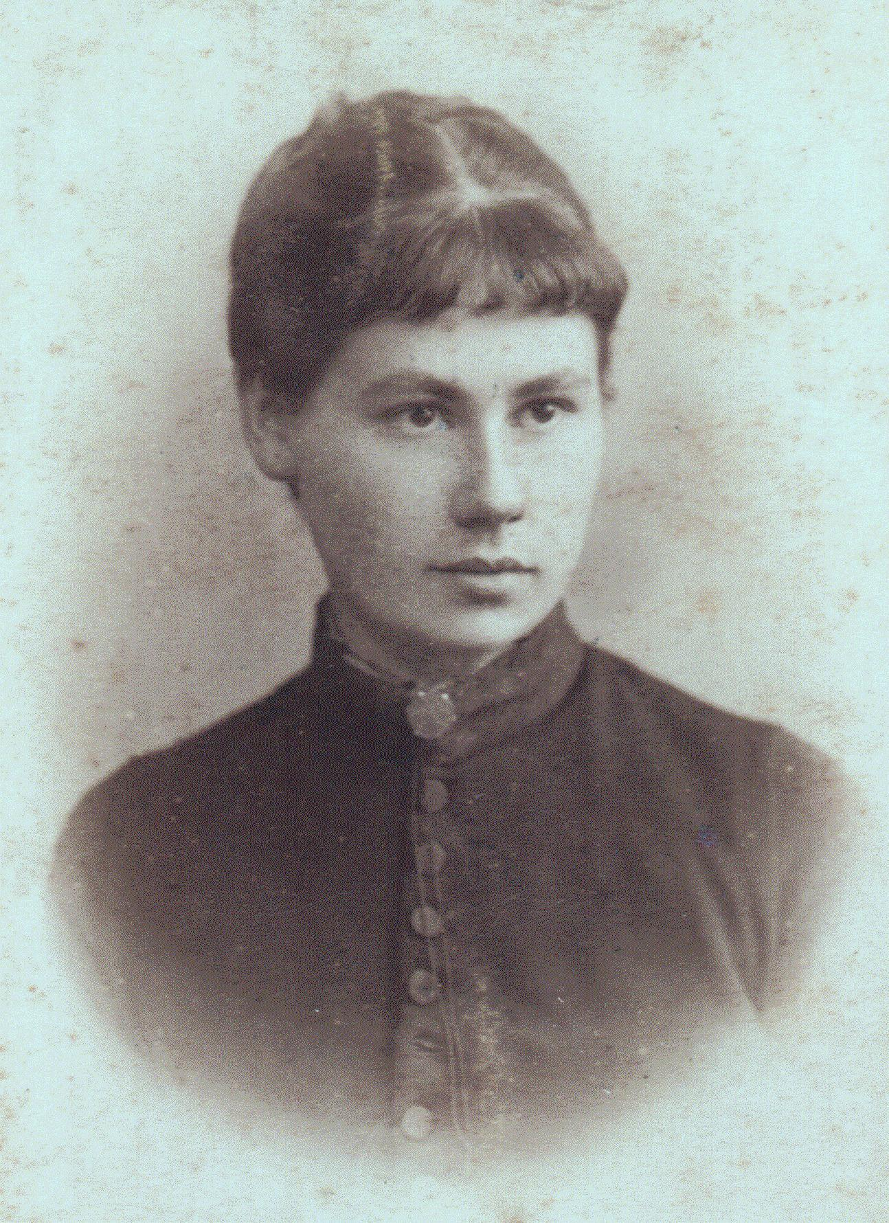 Teresa z Nowina Konopków Żurowska około 1885 r.